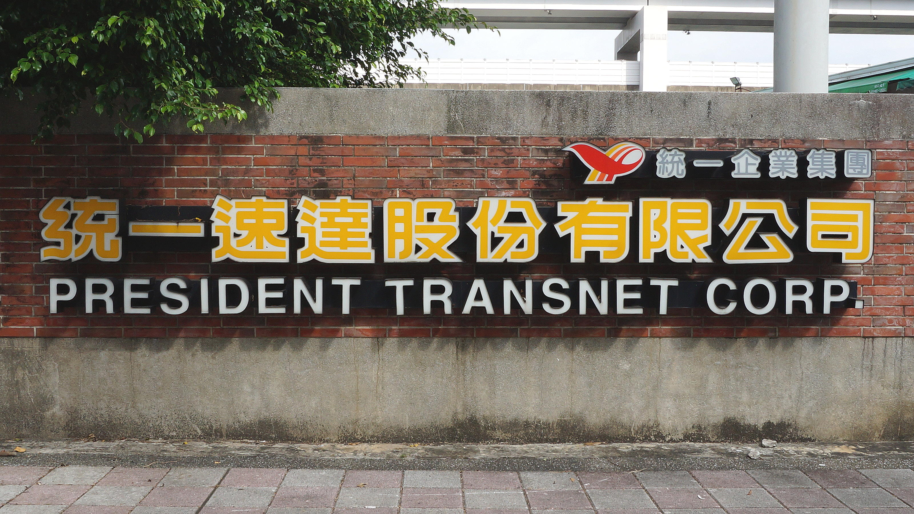 臺北市南港區重陽路，統一速達南港營業所圍牆，統一速達全銜燈箱。